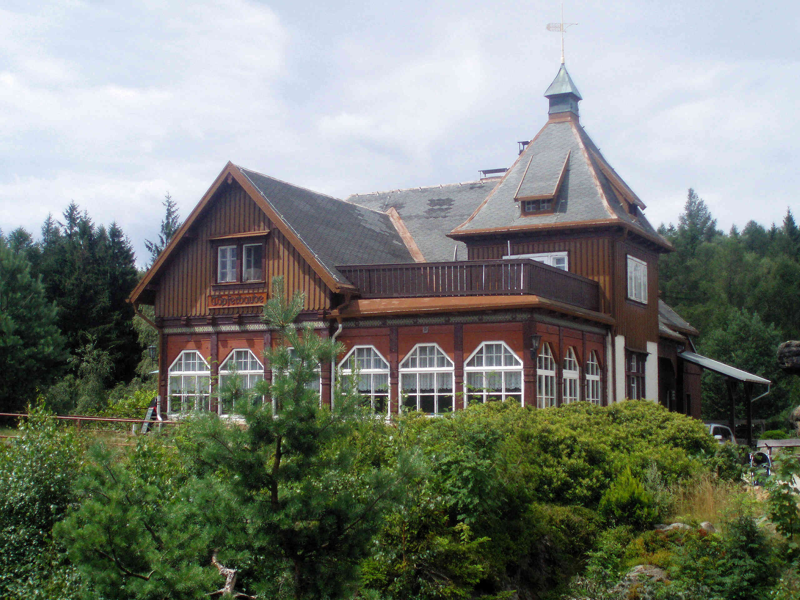 Töpferbaude